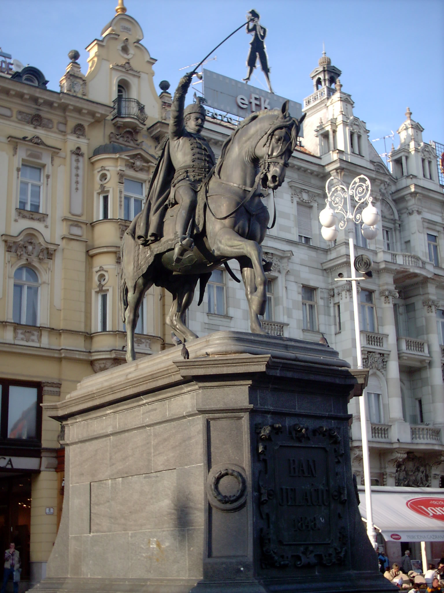 Ban-Jelacic-Denkmal in Zagreb, Bild selbst erstellt